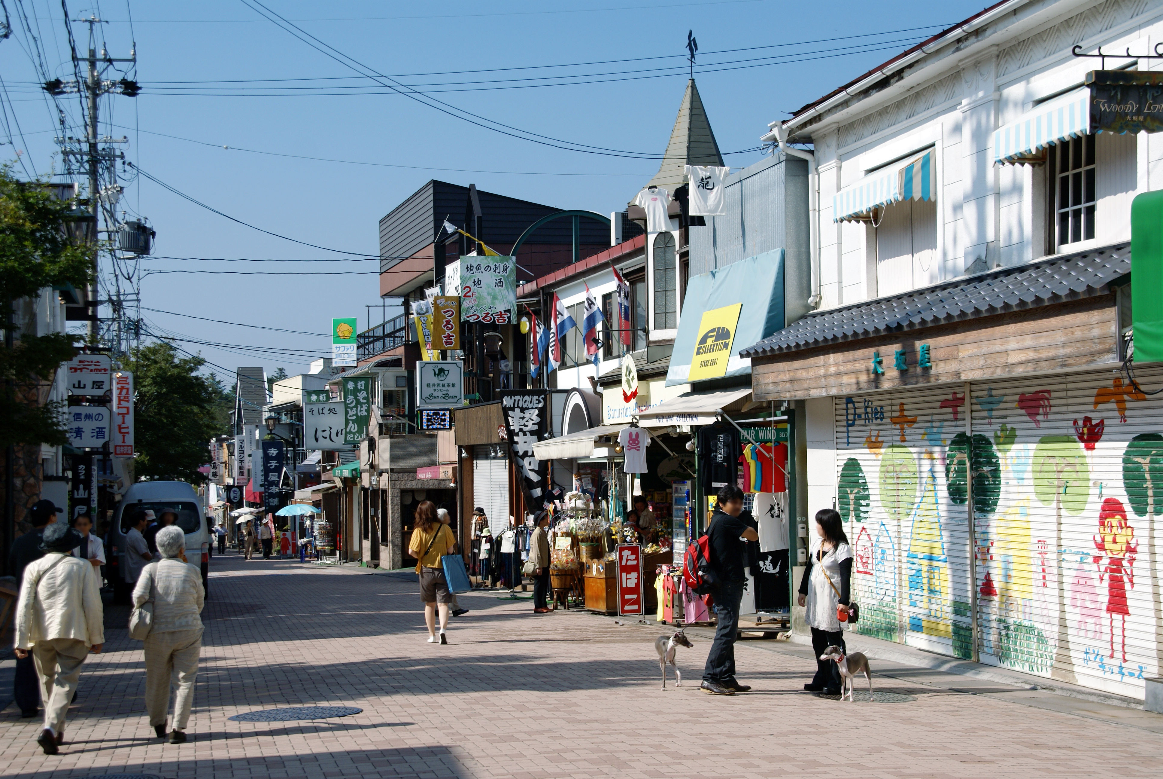 Old Karuizawa Ginza in Karuizawa, Nagano, Japan